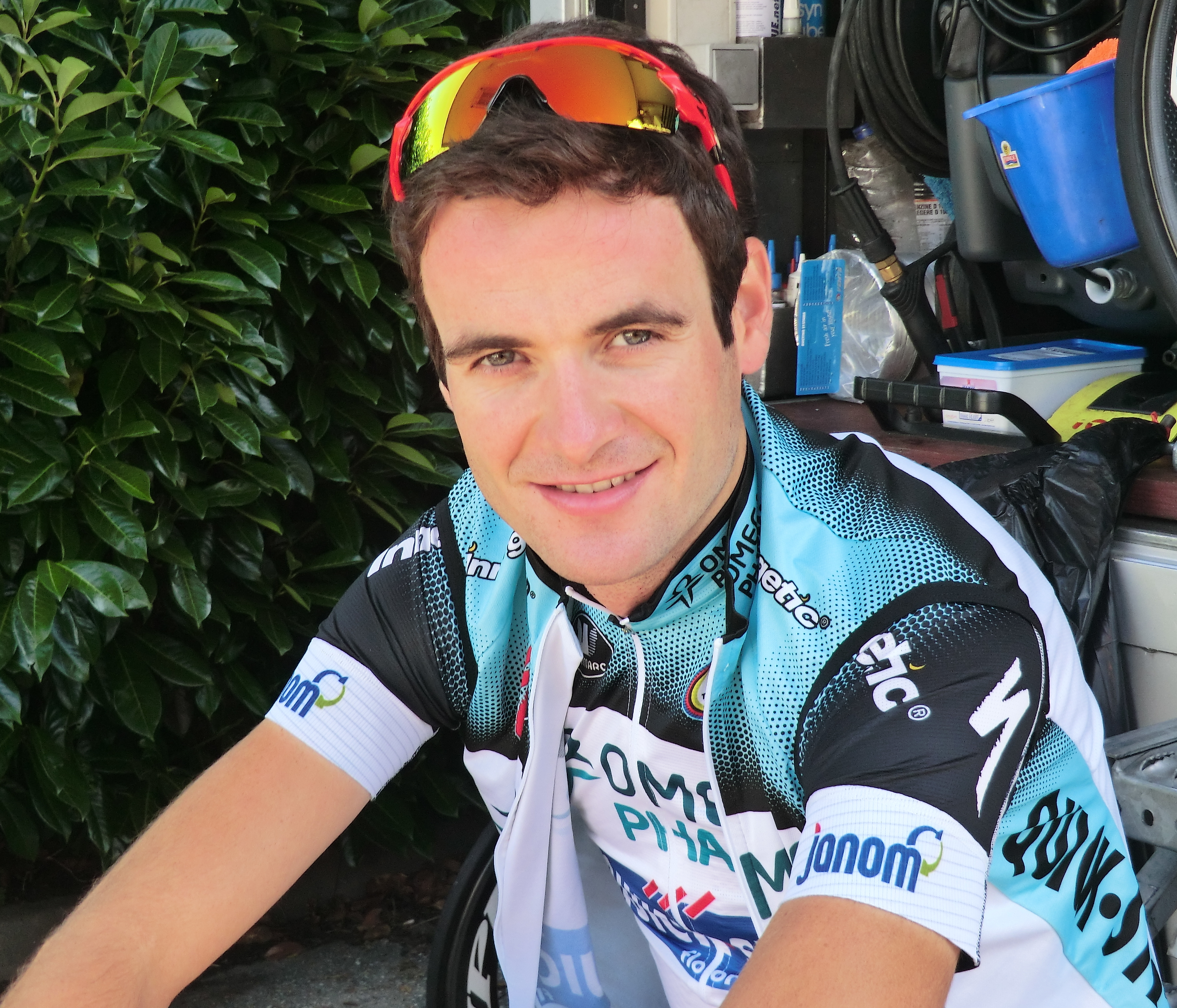 Coureurs à l'échauffement au matin du prologue du tour de l'Ain 2013, à l'hôtel Lyon-Est à Saint-Maurice-de-Beynost.